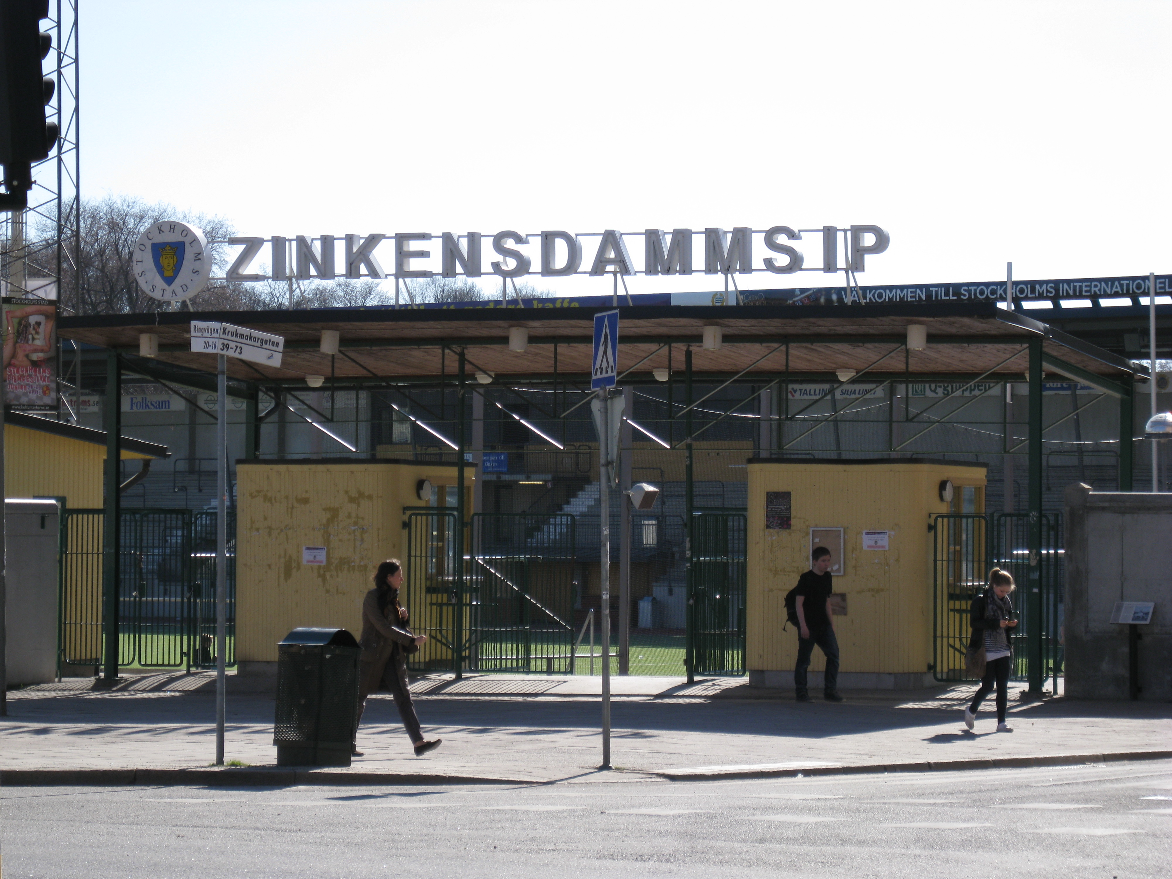 Zinkensdamms idrottsplats på Södermalm